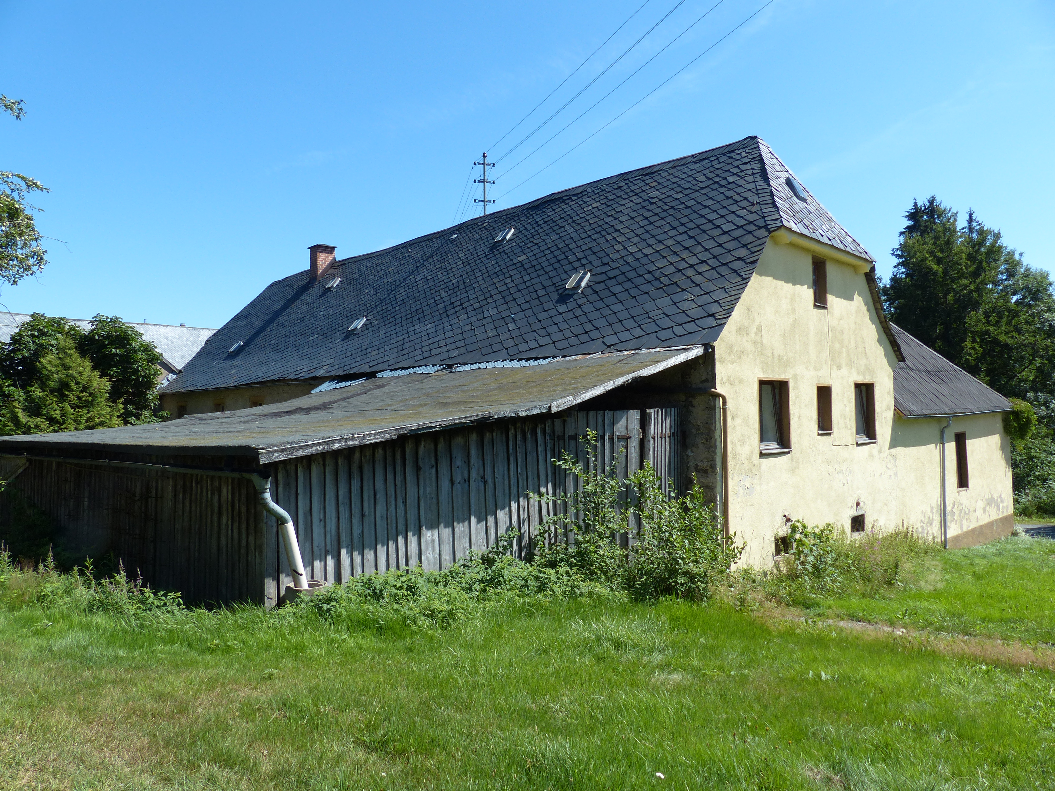 Franken, Ortsteil von Weißenstadt